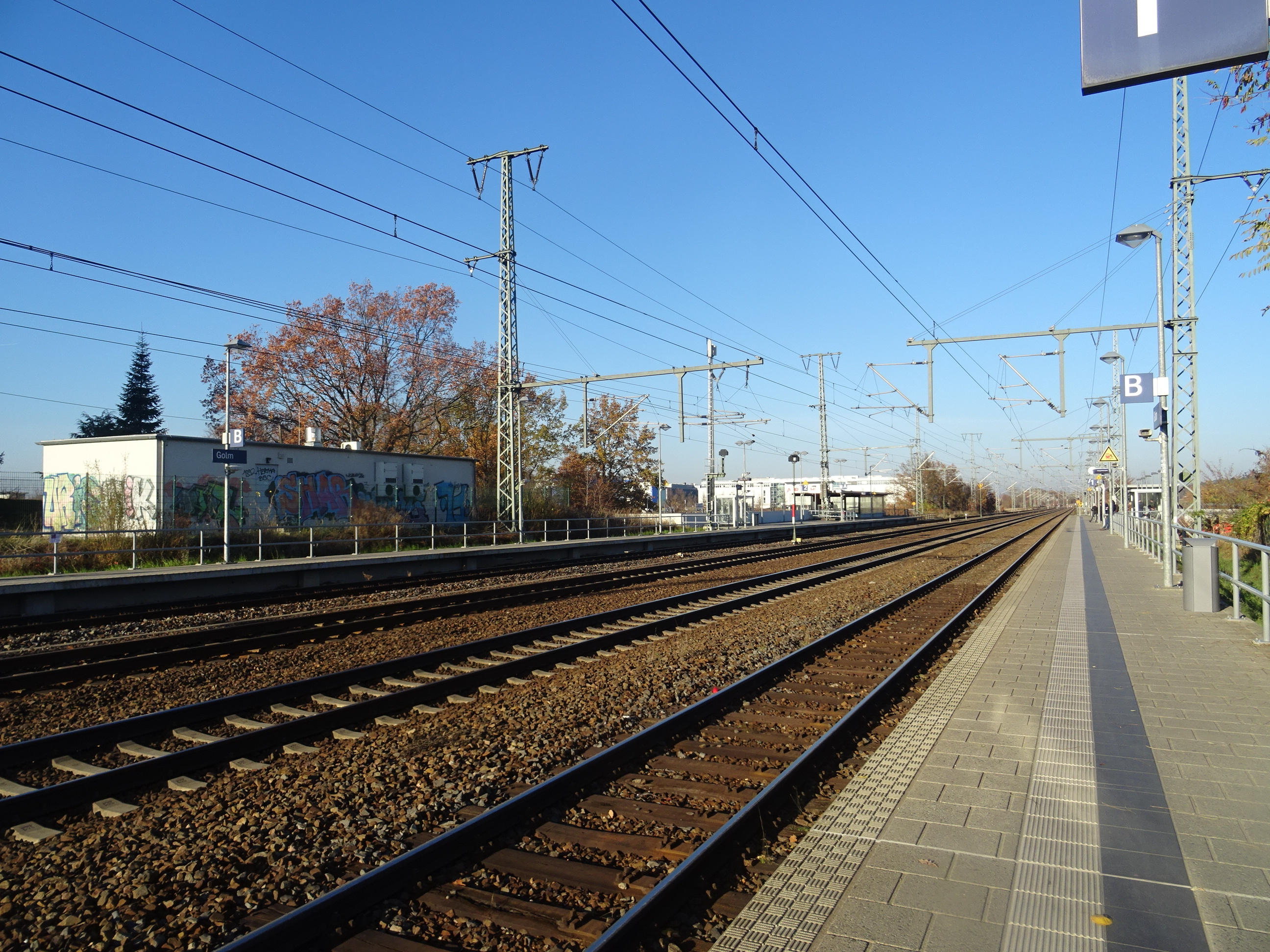 Bahnhof Golm. November 2018, Bahnsteige